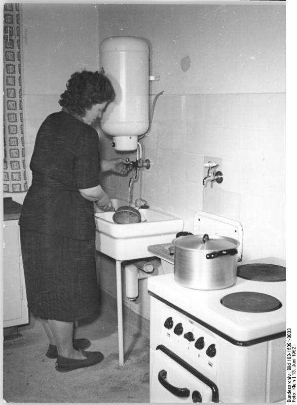 Zentralbild-Klein- Kne-Be. 13.6.52 Die Mieter des Hochhauses Weberwiese in Berlin und ide Hausfrau ist glücklich über die moderne Kücheneinrichtung. Siehe Begleittext